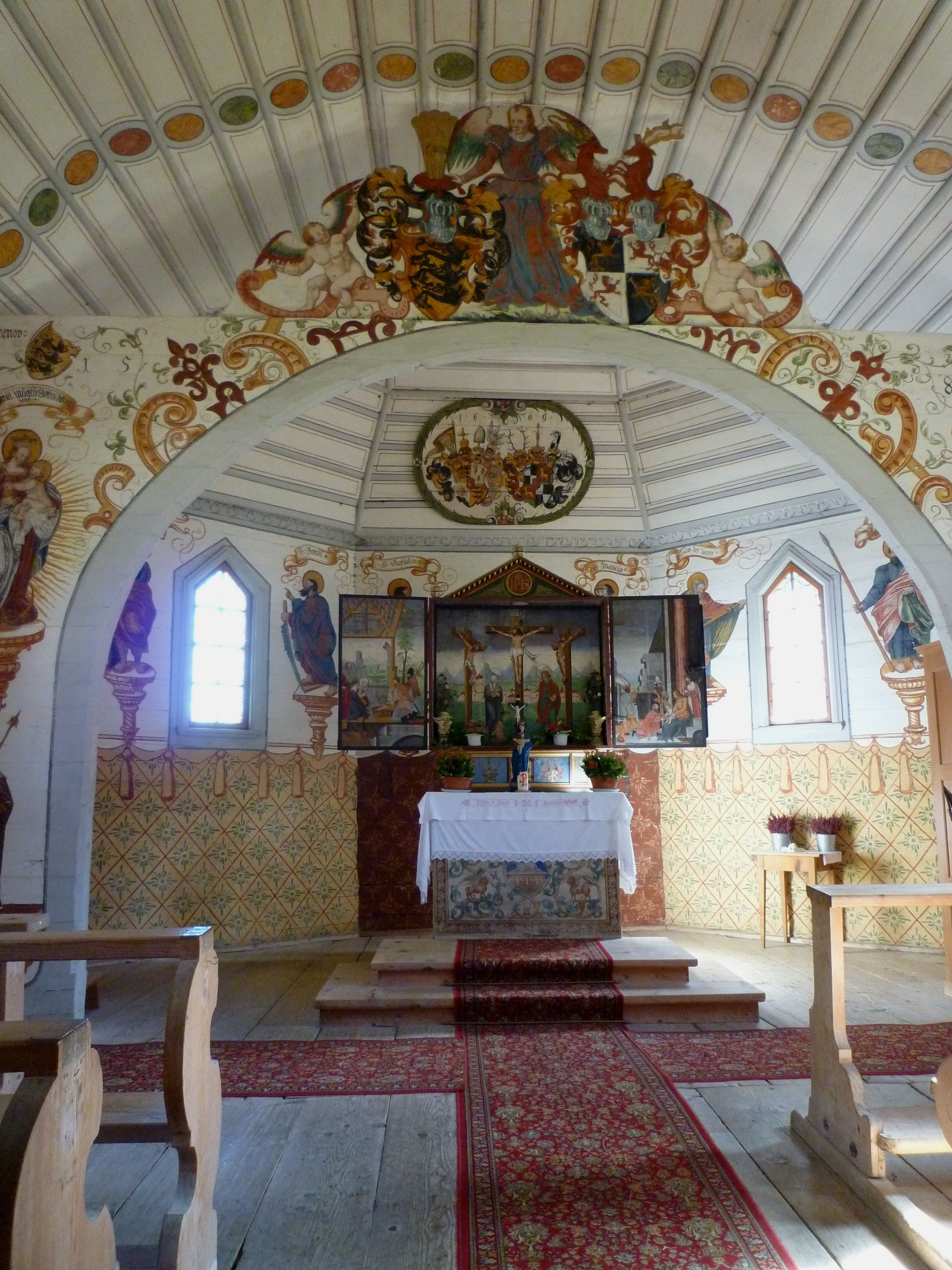 Oberstdorf - Rohrmoos 1070 ü.NN,St.Annakapelle 1568